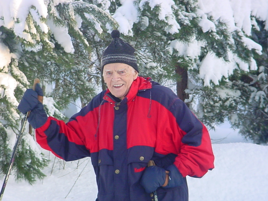 Kåre Kristiansen politiker Nesodden Norge KrF